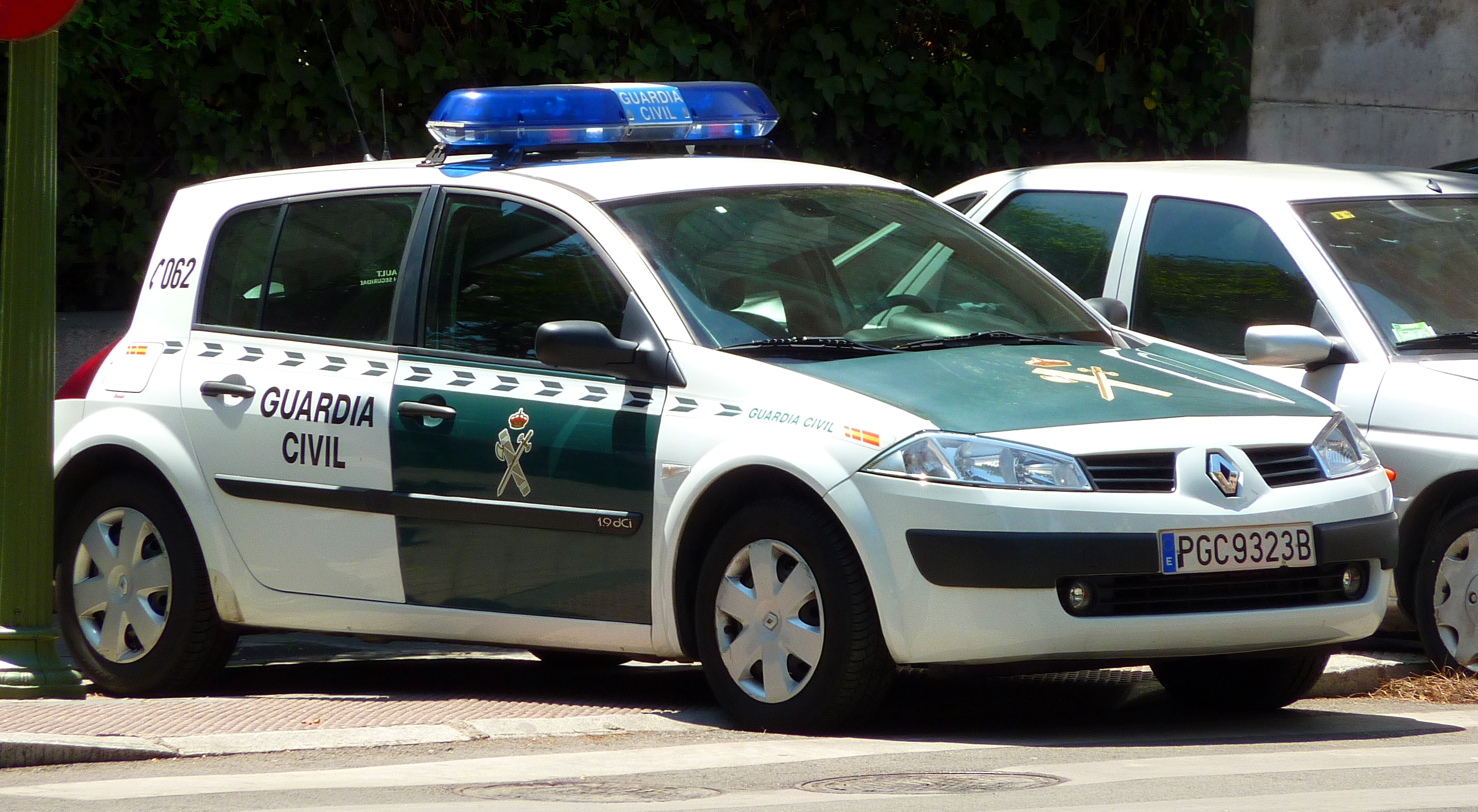 Renault Mégane de la Guardia Civil.